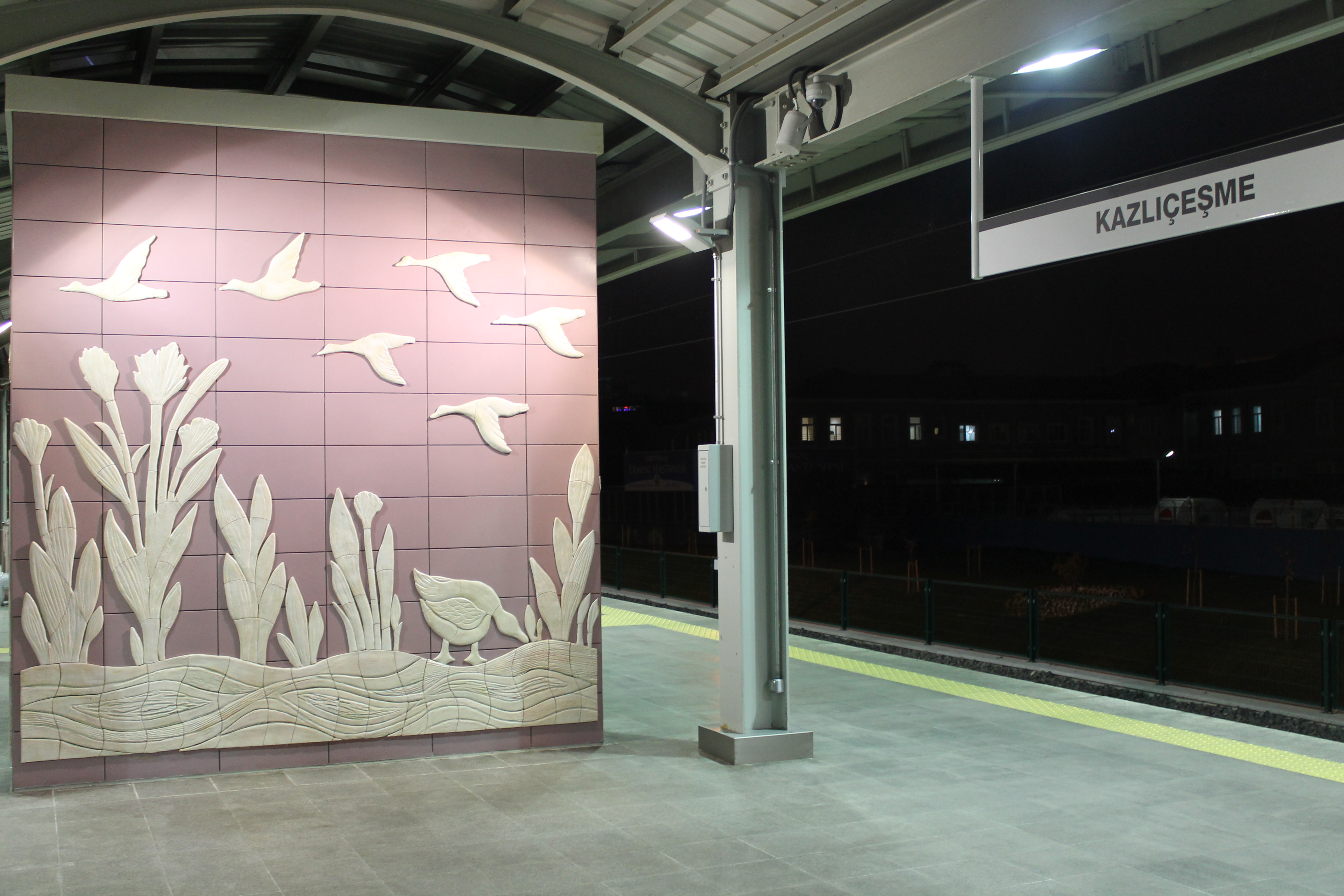 Marmaray, Kazlıçeşme durağı